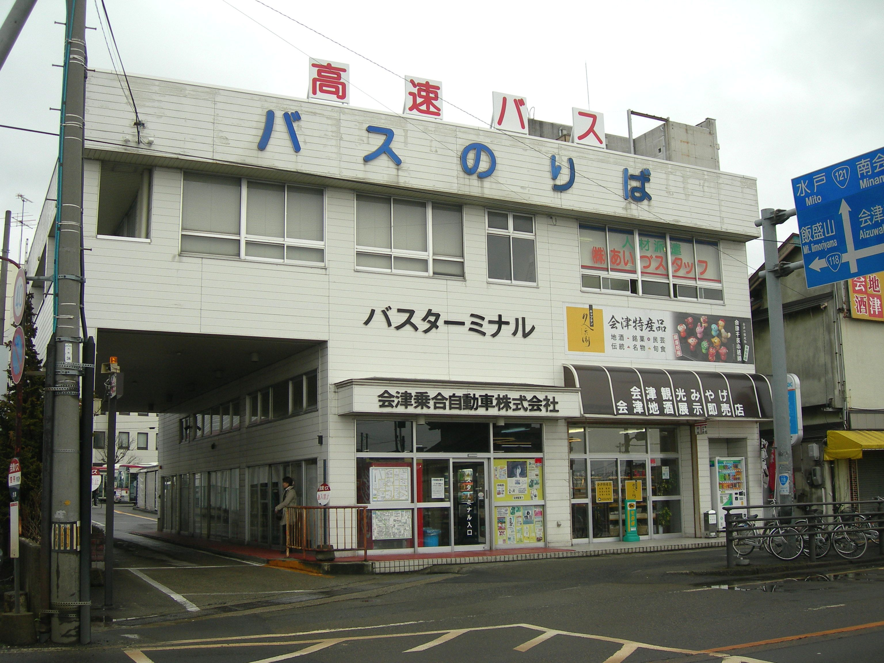 会津乗合自動車 本社兼若松営業所